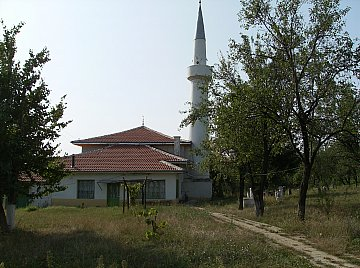 The_Mosque-Pravda,Bulgaria Най-старата и забележителна сграда в селото е джамията, построена още по времето на Османската империя ,през 1867 година,съответстваща на 1283 год. по мюсюлманското летоброене Хиджра. Тя е ремонтирана няколко пъти и е в отлично състояние.